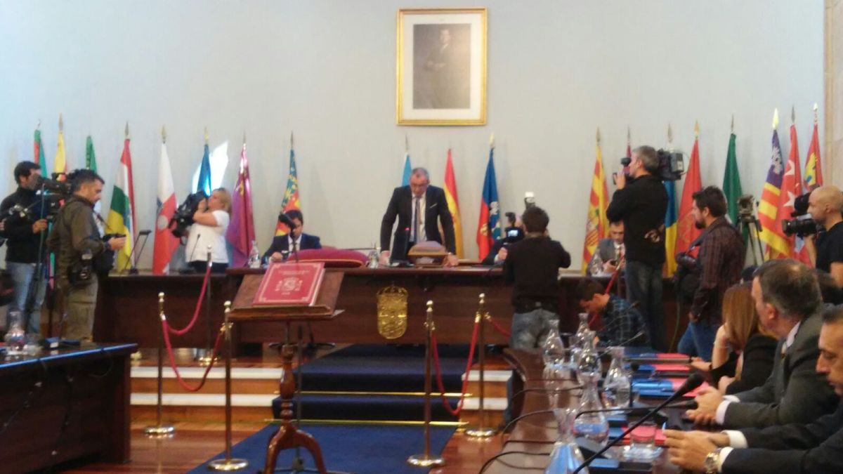 Darío Campos intervén tras tomar posesión da presidencia da Deputación de Lugo.